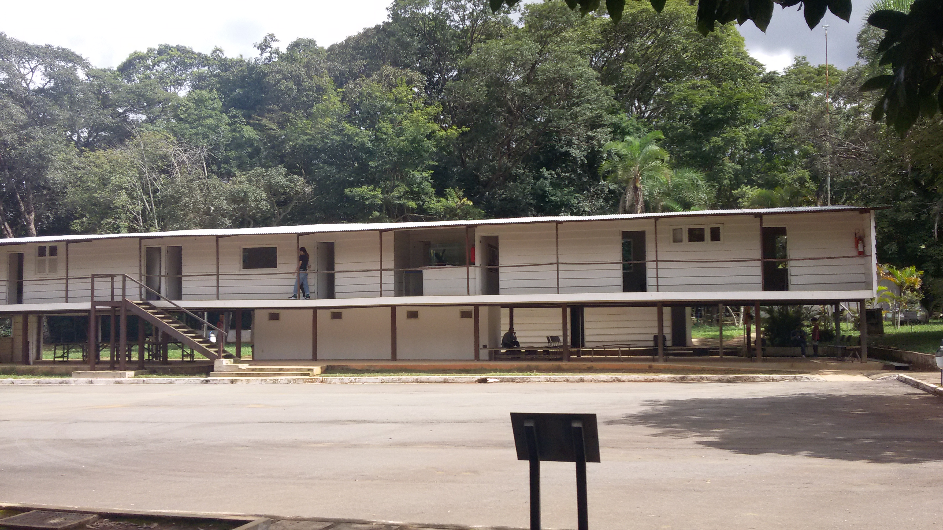 esa es la parte de frente del Palacio de las Tablas